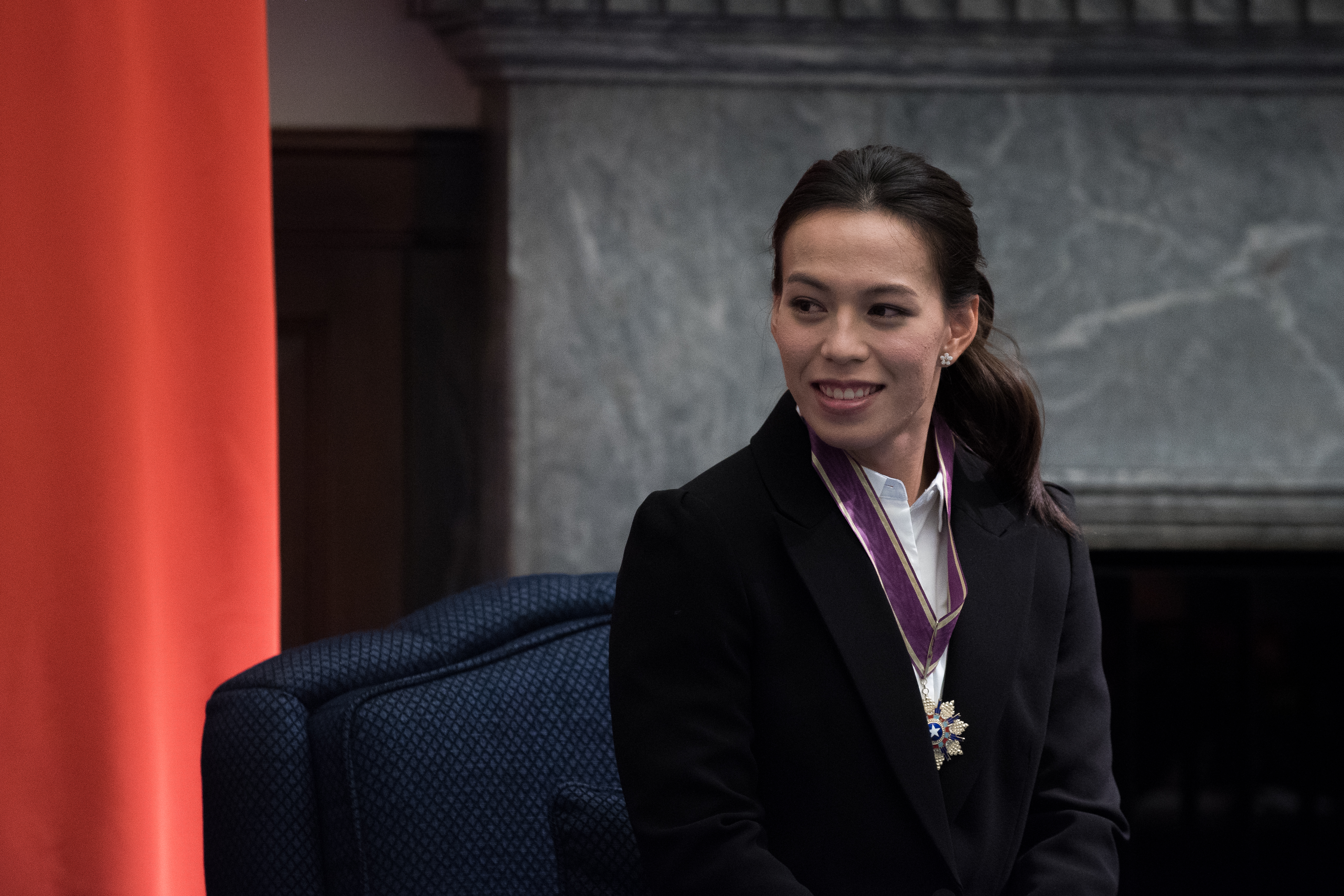 臺灣舉重運動員郭婞淳。